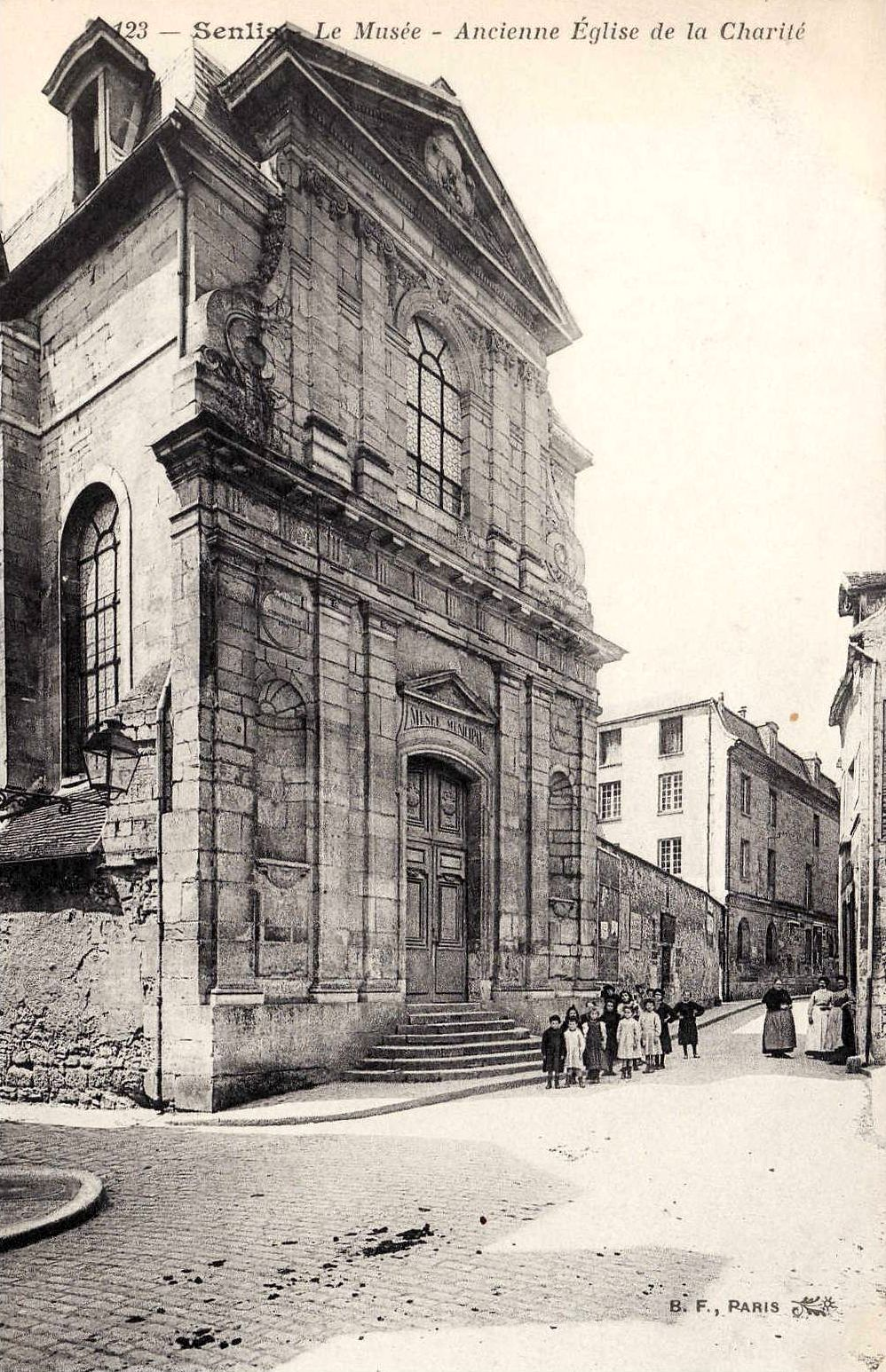 La chapelle de l'ancien hôpital de la Charité, rue de Meaux / rue de la Poterne.